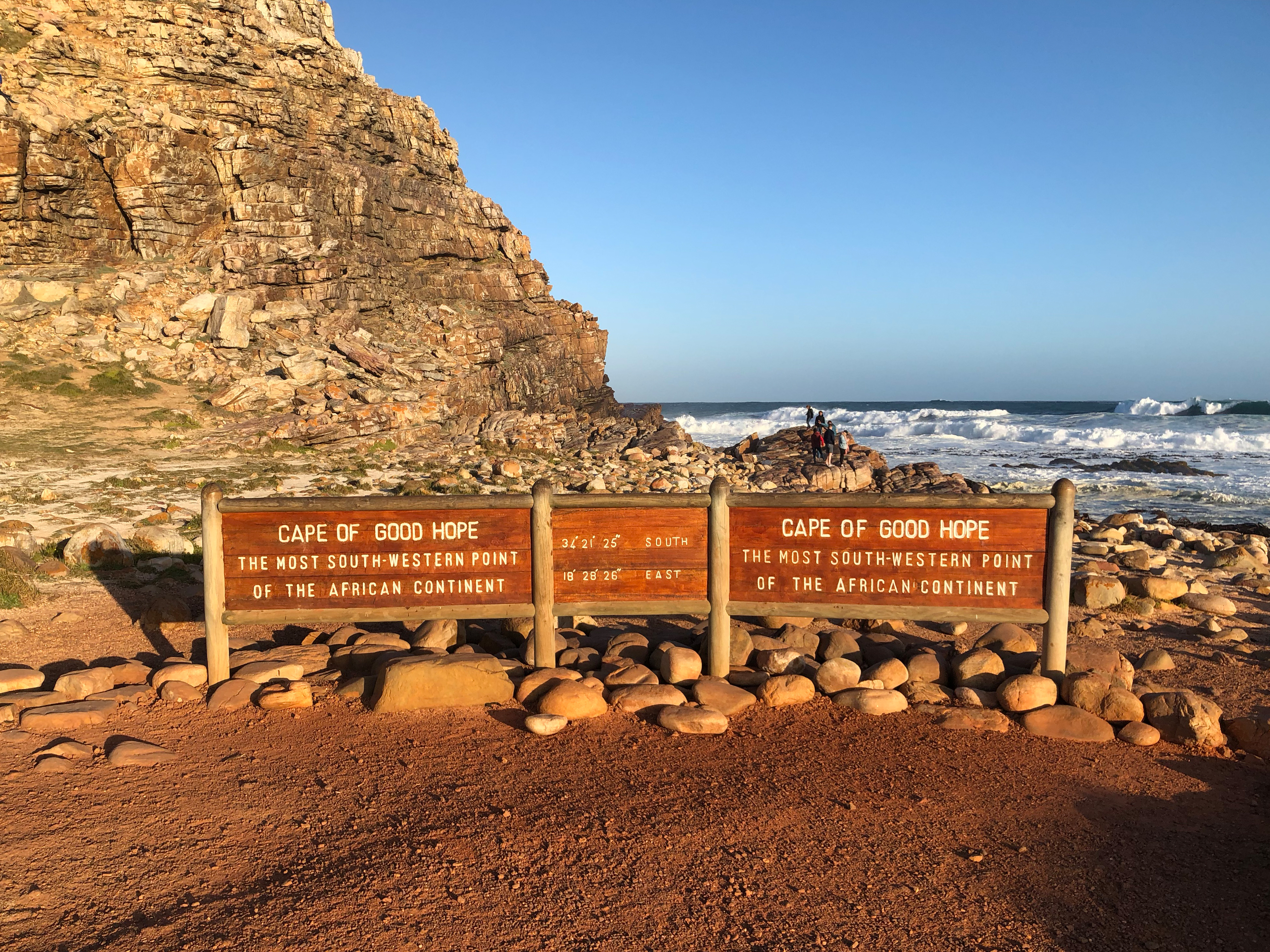 Kap der guten Hoffnung am Abend.